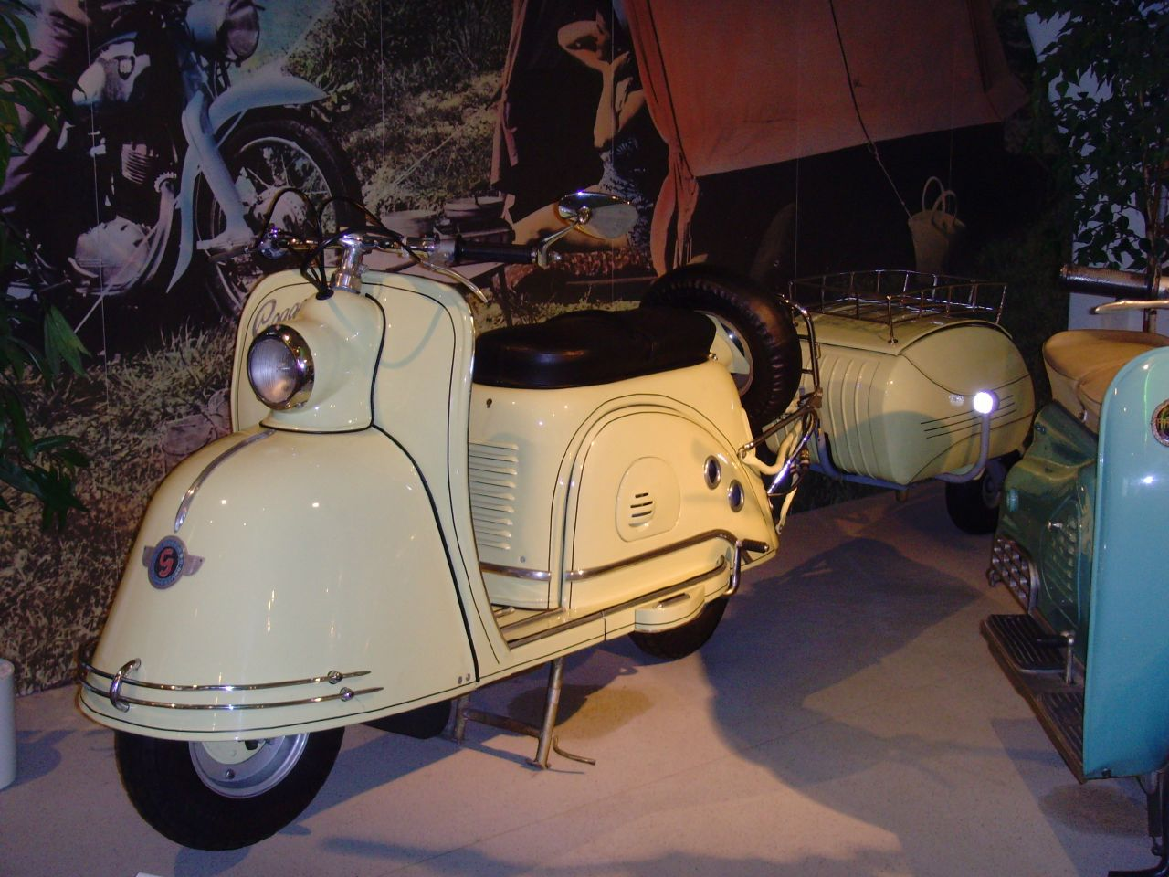 200 ccm, 10 PS, 90 km/h. Deutsches Zweirad- und NSU-Museum Neckarsulm.